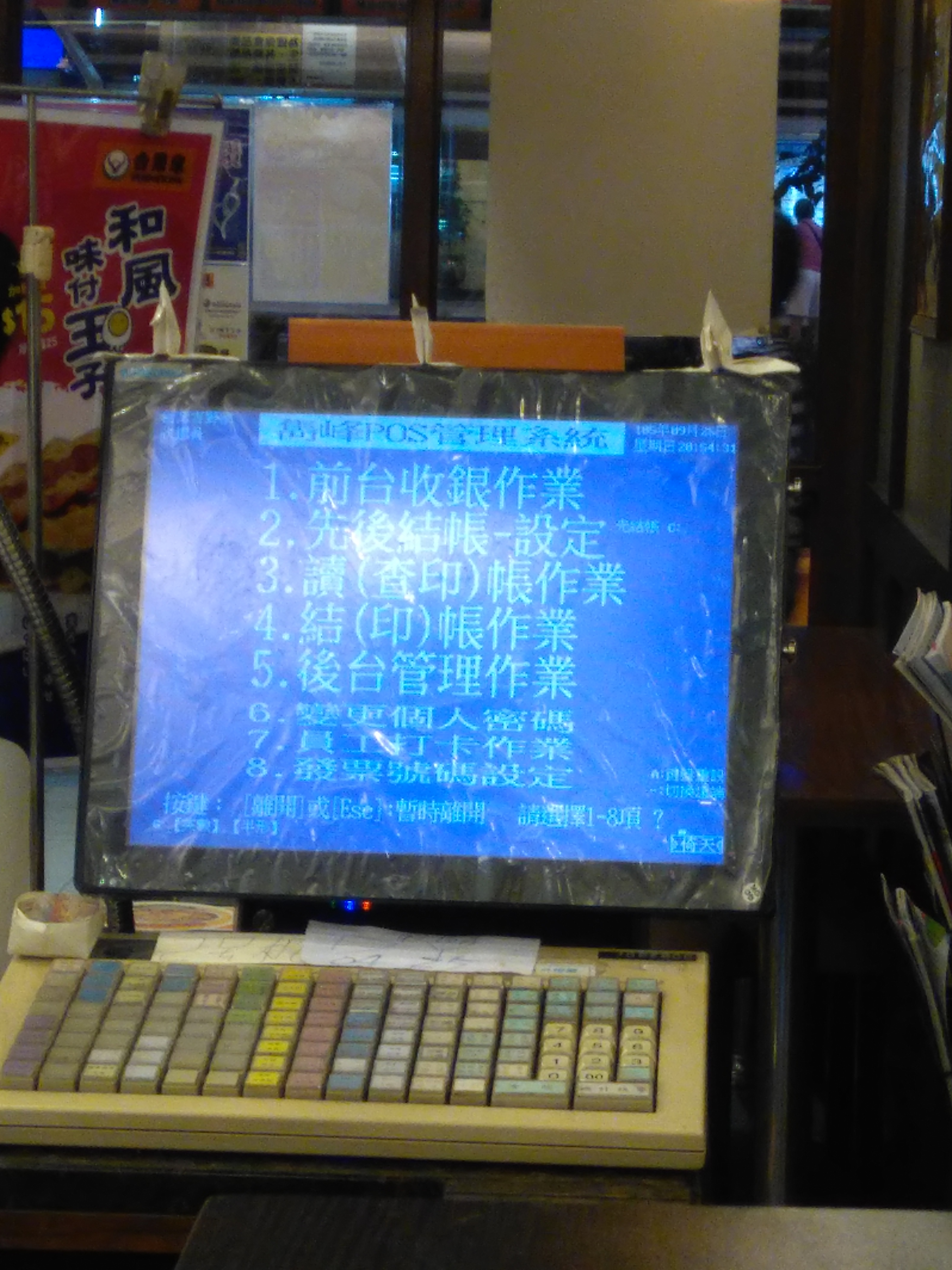 中文（香港）: 在台灣吉野家收銀機用上的倚天中文系統